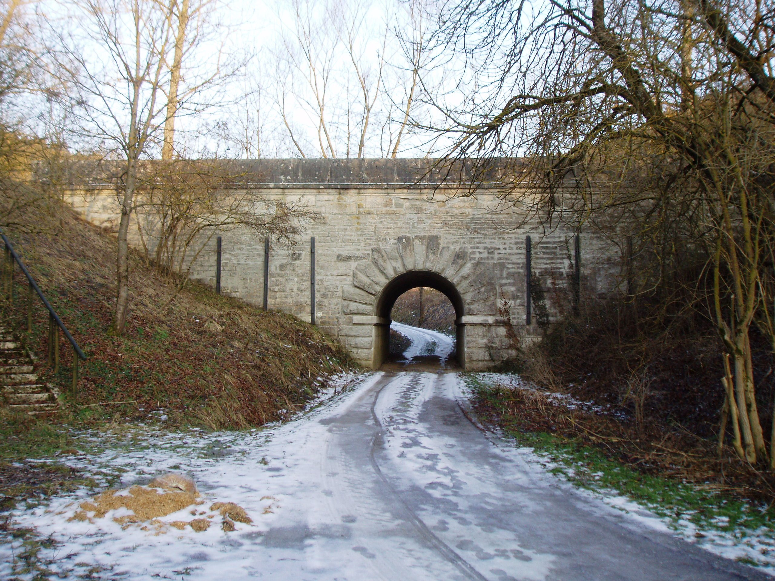 Ludwigskanal Gößeltal-Kanalbrücke bei Beilngries